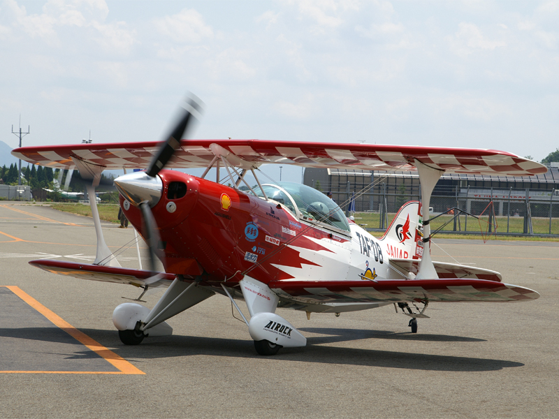 エアロック･エアロバティックチームのアビアットS-2Bピッツスペシャル